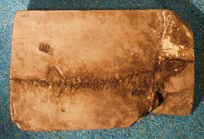 Fossil of Hylaeobatrachus, an extinct amphibian Took the photo at Musee d'Histoire Naturelle, Brussels